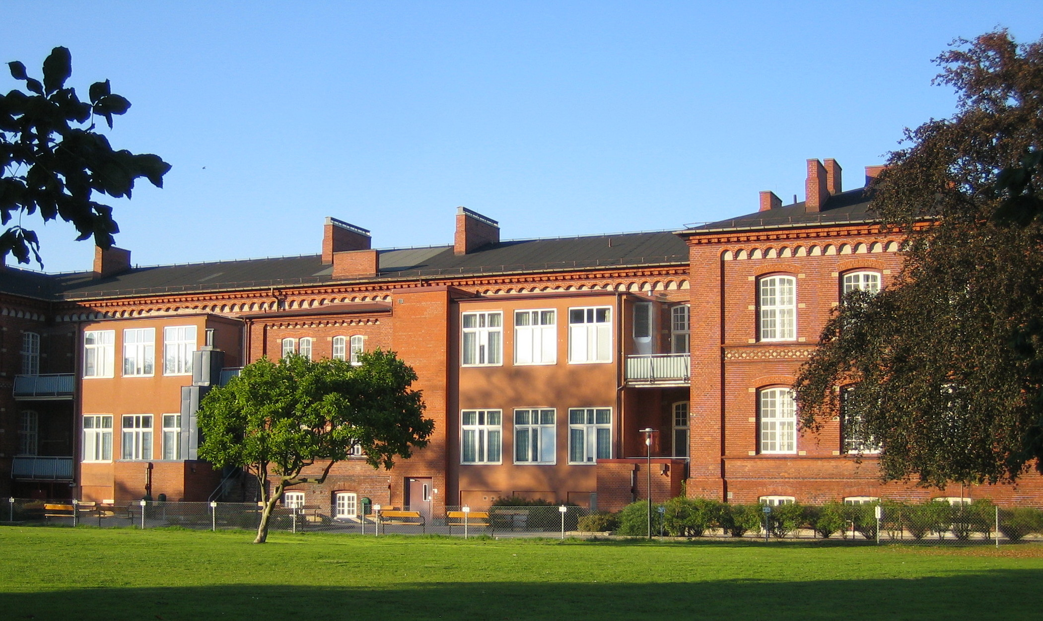 Rönnenskolan, Malmö, Sweden